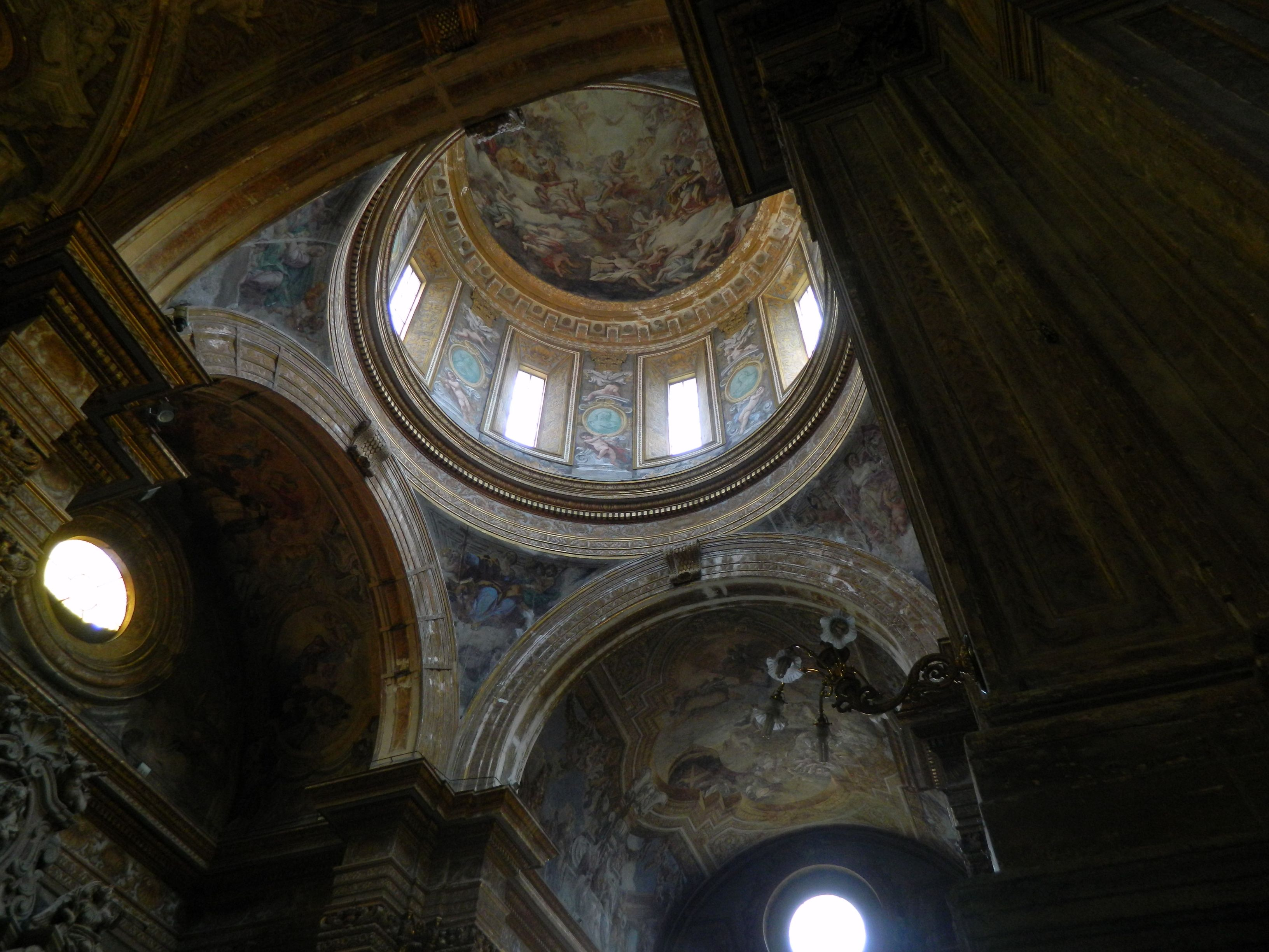 Chiesa di Santa Caterina a Formiello (Napoli) - la cupola di Paolo de Matteis